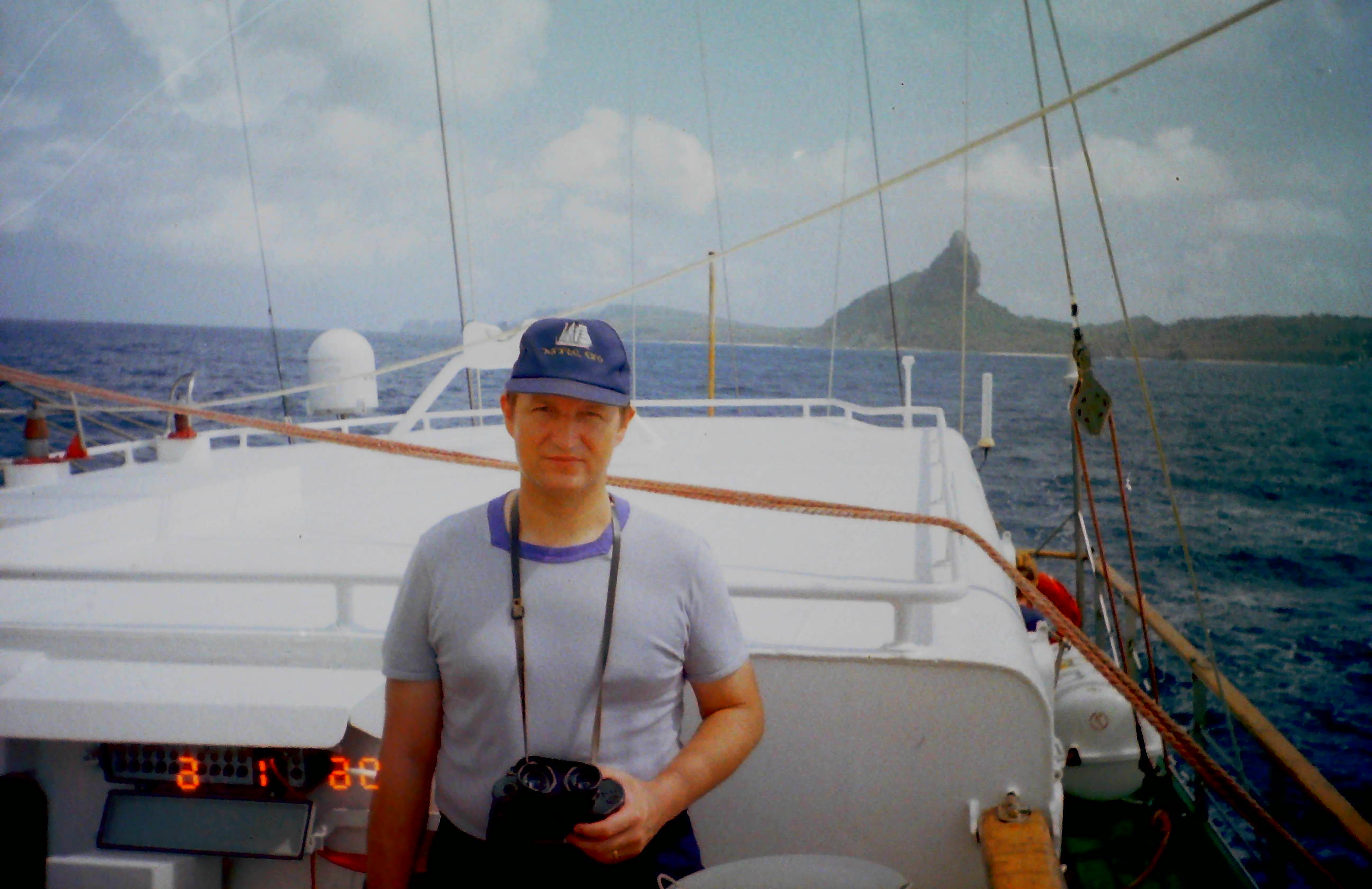 Kmdr. por. Czesław Dyrcz w rejsie dookoła świata podczas pełnienia wachty morskiej.